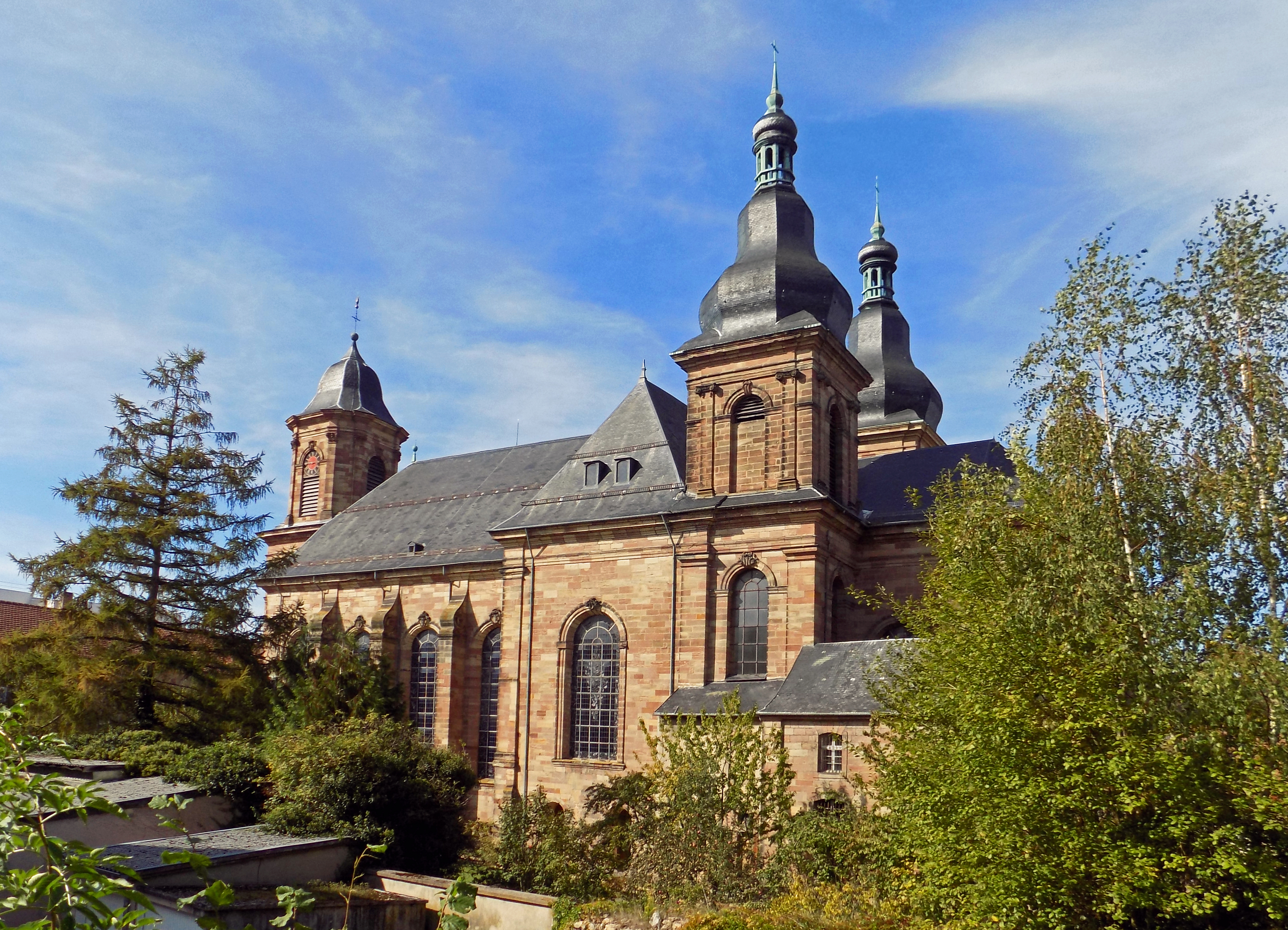 Abbatiale Saint-Nabor (vue du chevet) de Saint-Avold (Moselle). Cette prestigieuse abbaye fondée au (VIe siècle) a été reconstruite au (XVIIe siècle) et (XVIIIe siècle); grandes orgues restaurées ; sur la façade de l'église abbatiale, statue représentant la Religion ou la Foi du sculpteur Pierre-François Le Roy (1739-1812) provenant du portail de Blondel de la cathédrale Saint-Étienne de Metz.